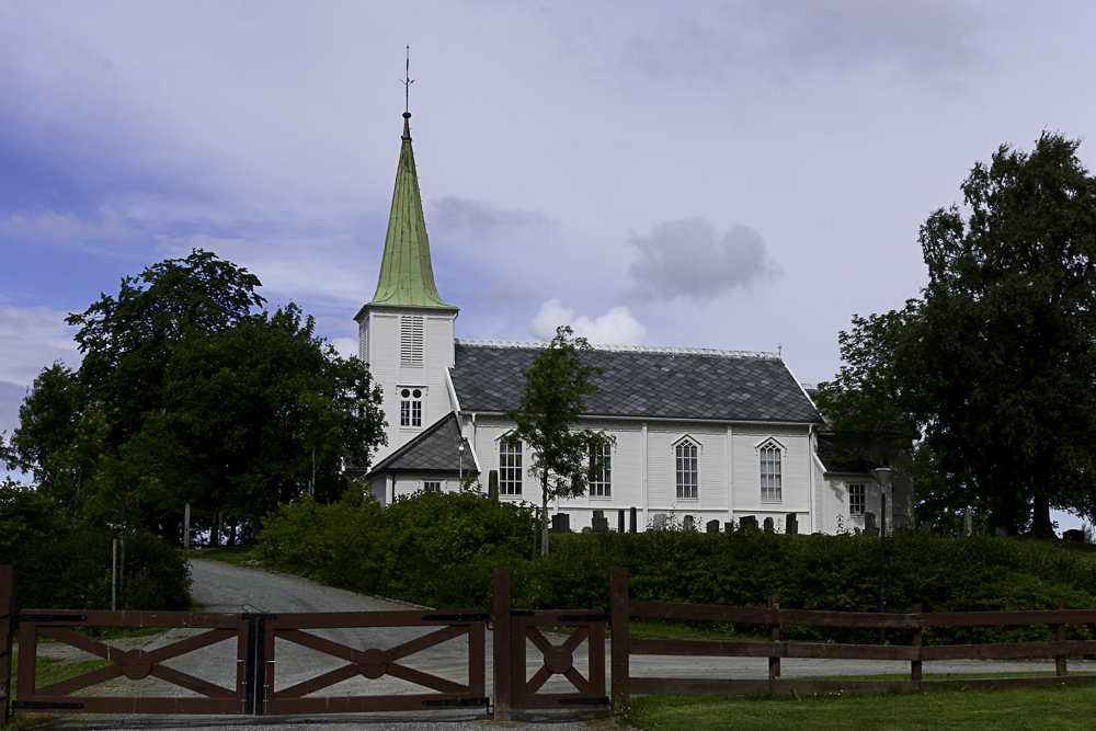 Tiller kirke